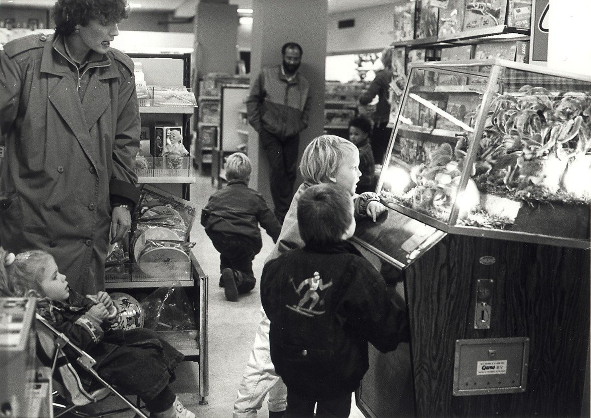 CollectieCollectie Fotoburo de BoerInventarisnummerNL-HlmNHA_54020775BeschrijvingMet open mond kijken grote en kleine mensen naar de muzikale aapjes in de Bimbobox op de speelgoedafdeling van Vroom en Dreesmann aan het Verwulft. Aangekocht in 1988 van United Photos de Boer bv. - Negatiefnummer 28219 k 19 A. - Gepubliceerd in het Haarlems Dagblad van 10.10.1987. Identificatienummer 54-020775FotonummerKNA006013326Naam objectVroom en DreesmannInterieur/ExterieurInterieurAnnotatiesC059 54/55-035 7049LandNederland ProvincieNoord-Holland GemeenteHaarlem PlaatsHaarlem StraatVerwulft Begindatum04-12-1987Einddatum04-12-1987Datering gebeurtenis04-12-1987TechniekFoto Trefwoordenaap, bimbobox, warenhuis CopyrighthouderUnited Photos de Boer b.v.